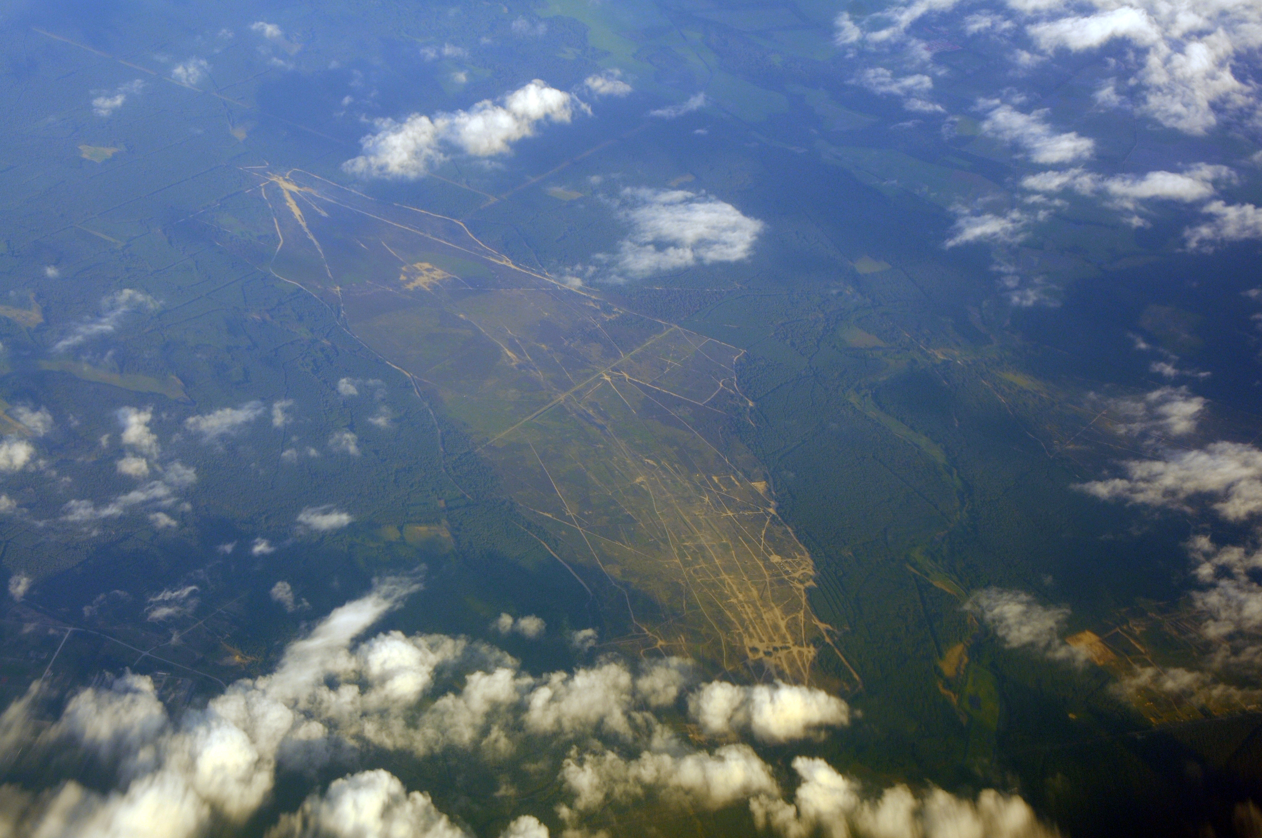 Truppenübungsplatz Jägerheide Eggesin